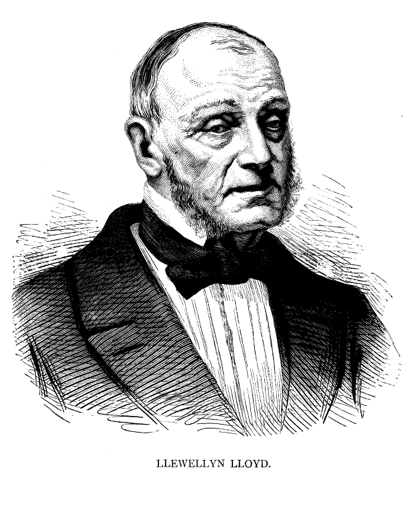 Llewellyn Lloyd